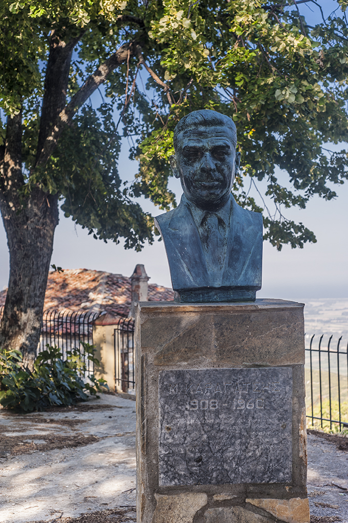 Προτομή του Μ. Καραγάτση στην εκκλησία του Αγίου Αθανασίου στην Ραψάνη.